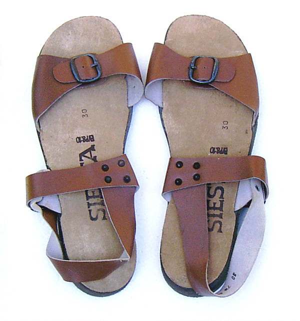 Jesuslatschen, DDR-Produktion, um 1985